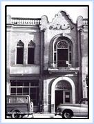 Template:Move to Commons